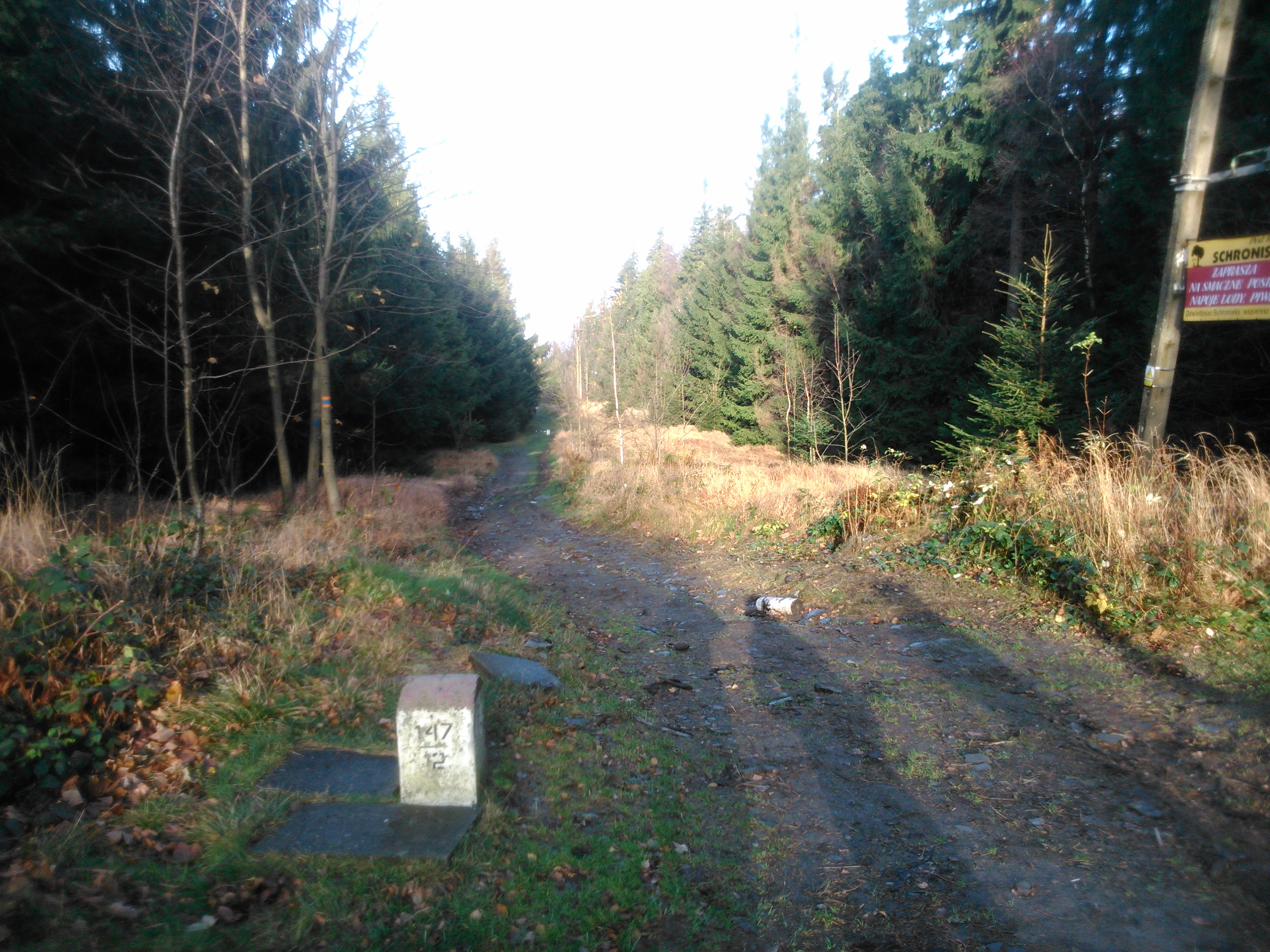 Granica polsko-czeska na Biskupiej Kopie